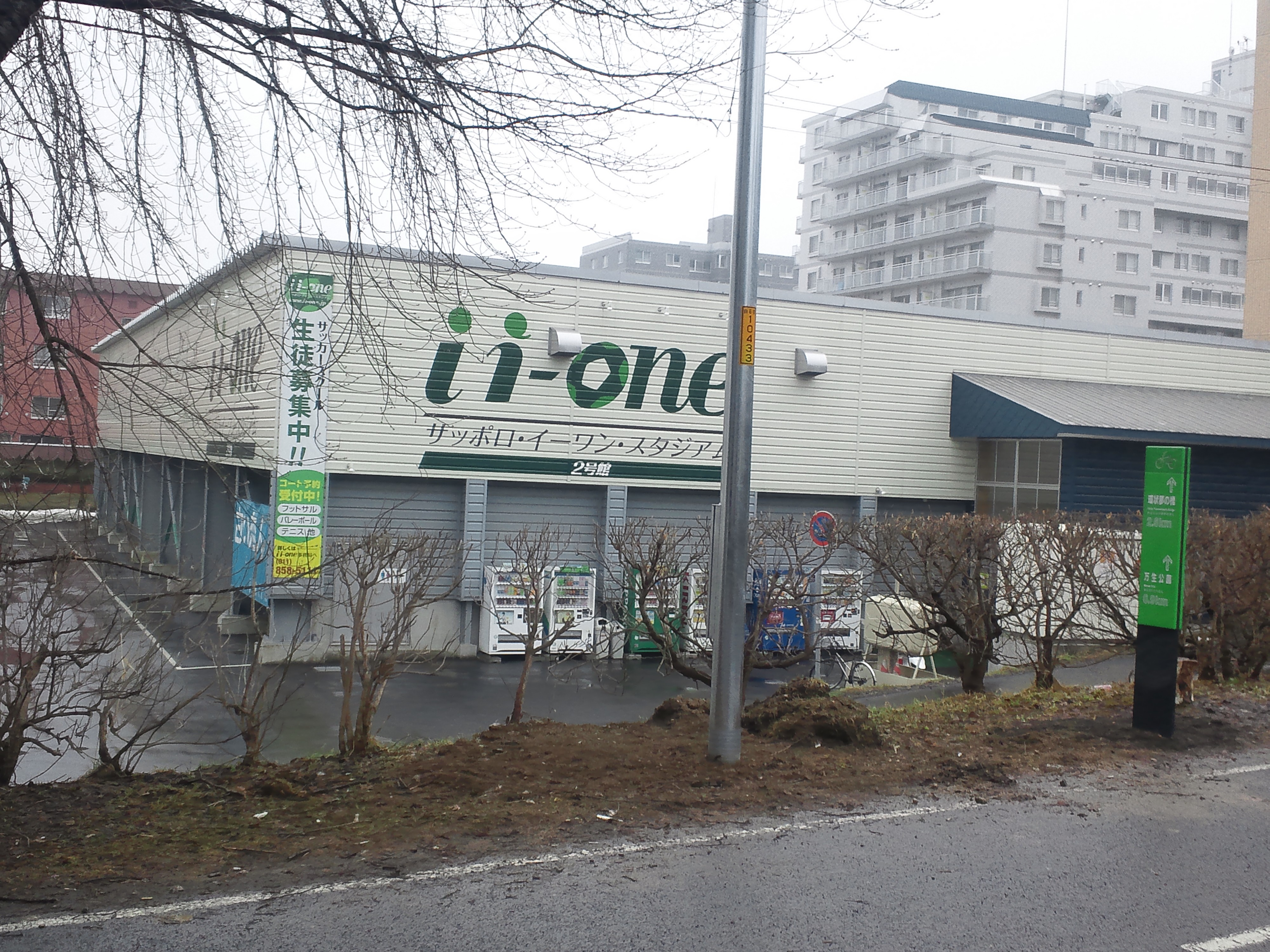 札幌市白石区に所在するフットサル専用室内グラウンド（2012/04撮影）